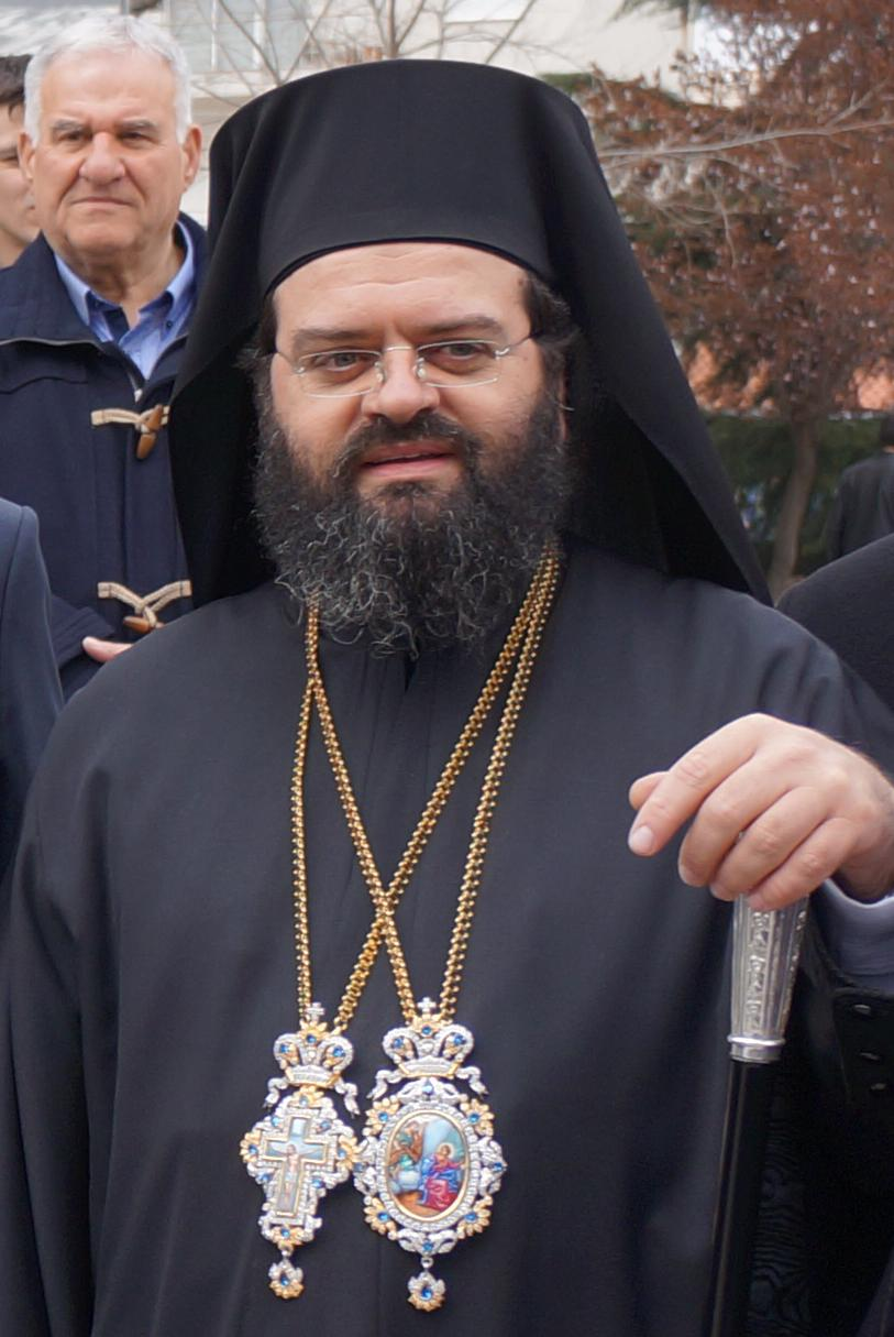 Μητροπολίτης Μαρωνείας και Κομοτηνής Παντελεήμων Μουτάφης